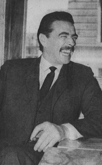 Fotografía del poeta y compositor uruguayo Osiris Rodríguez Castillos